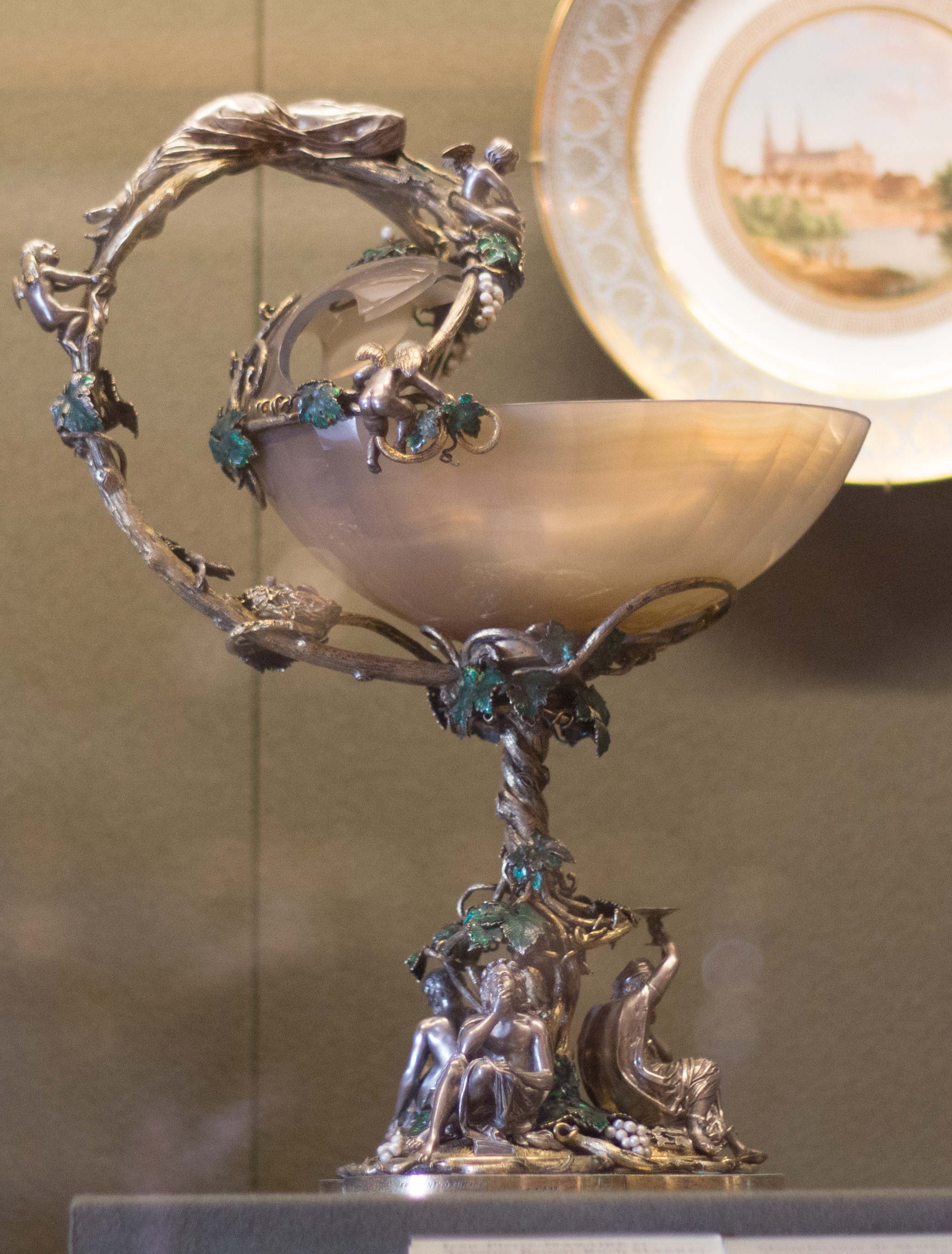 Conservée au musée du Louvre